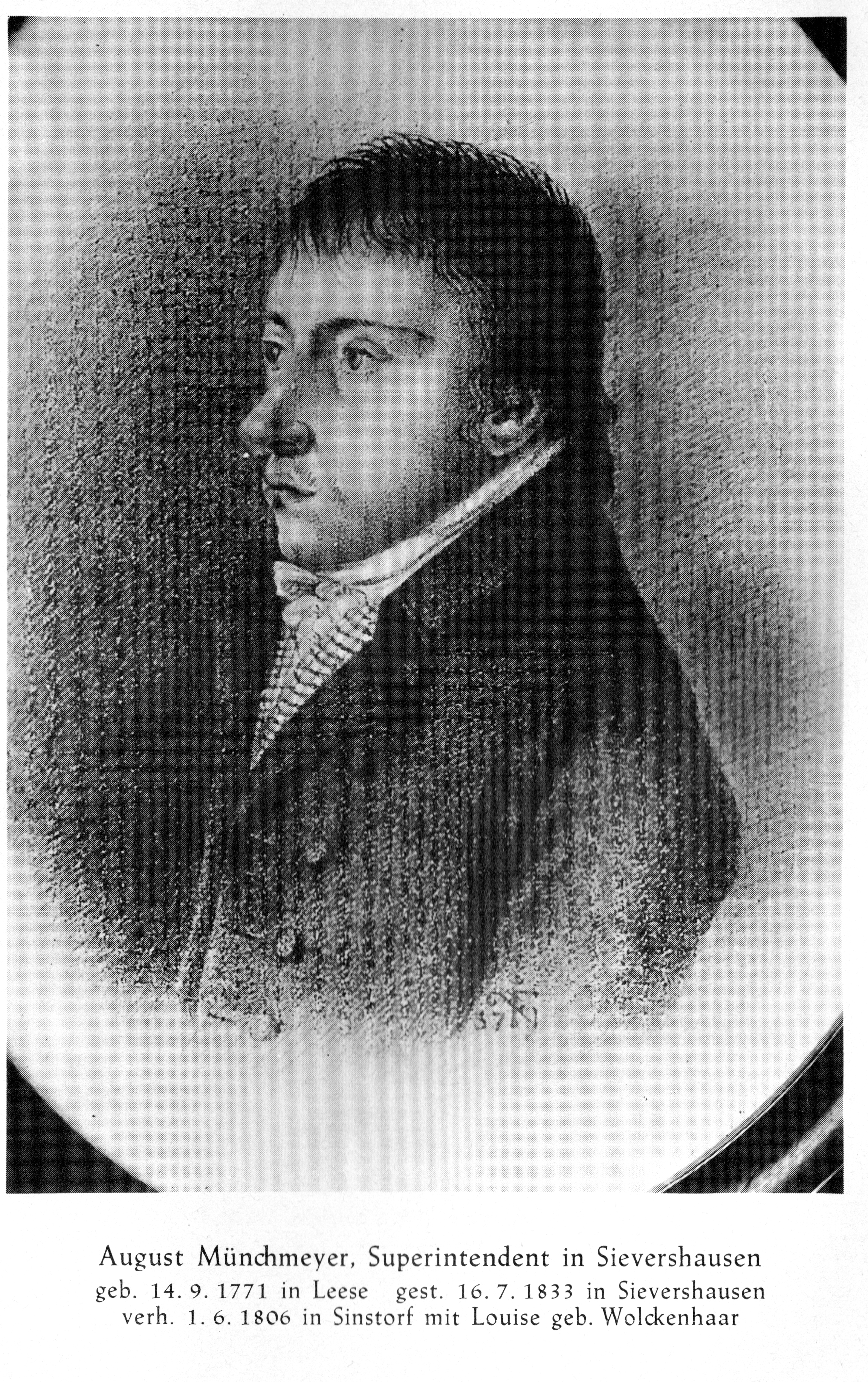 Johann August Conrad Münchmeyer (Rufname: August), Theologe, 1771-1833